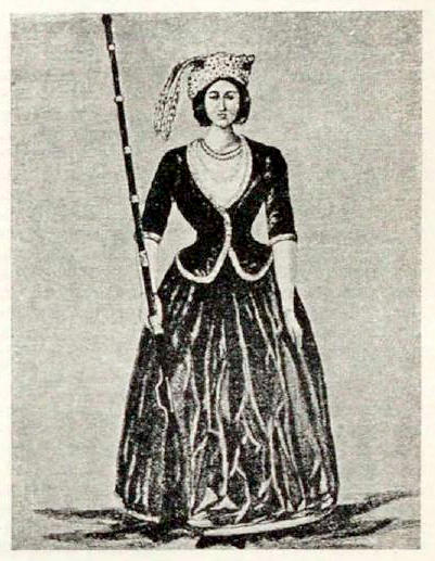 Данное изображение было использовано в статье «Амазонская рота» опубликованной во втором томе «Военной энциклопедии», который был издан книгоиздательским товариществом Ивана Дмитриевича Сытина в 1911 году в столице Российской империи городе Санкт-Петербурге.